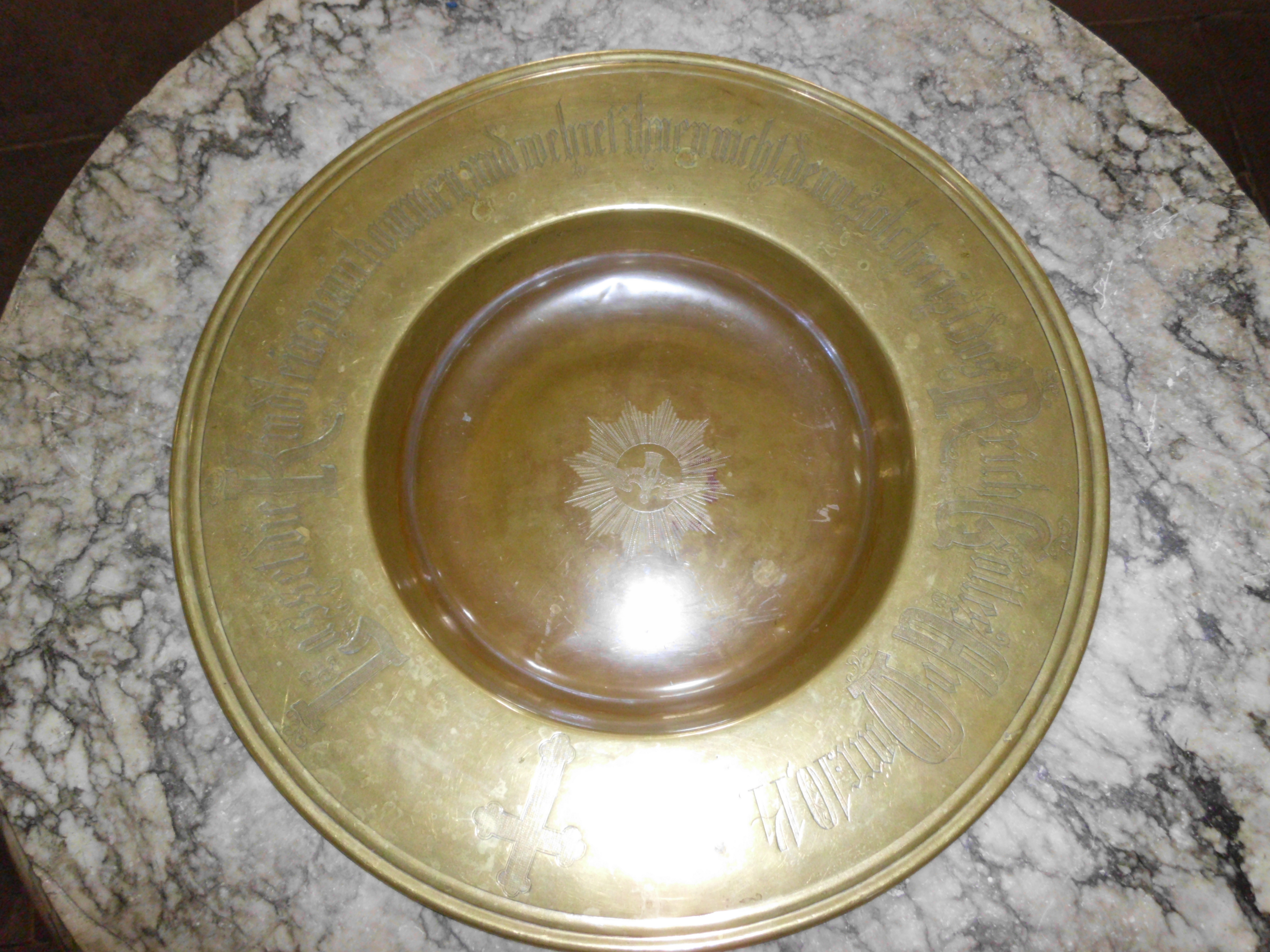 mit eingravierter Bibelstelle